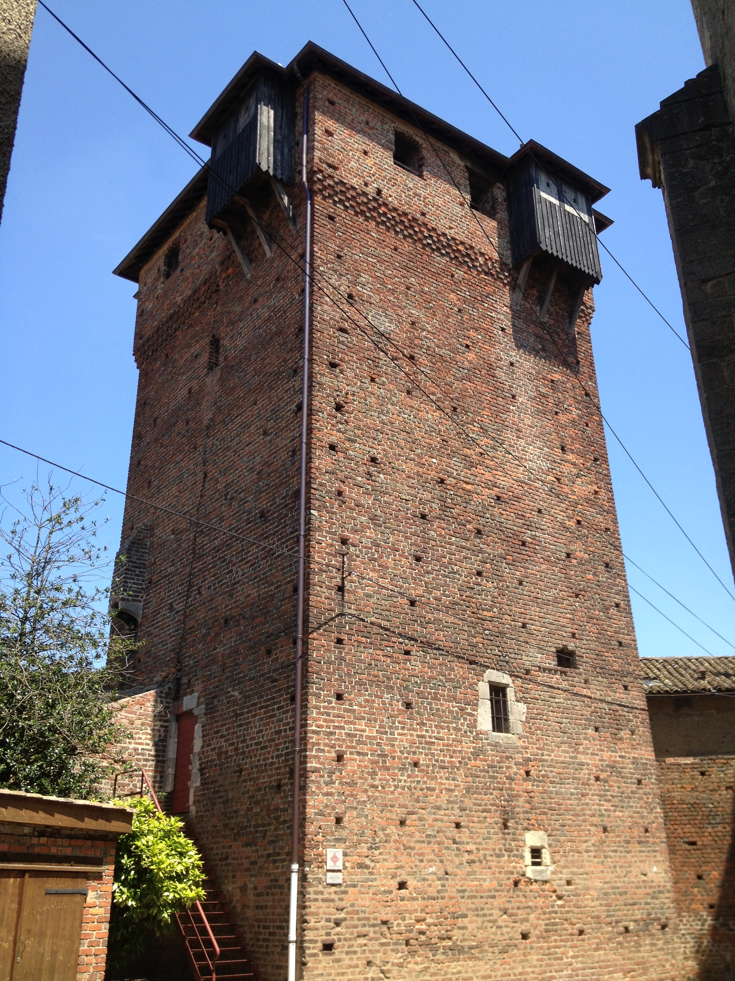 La (seule) tour du château d'Ambérieux-en-Dombes, encore en état.